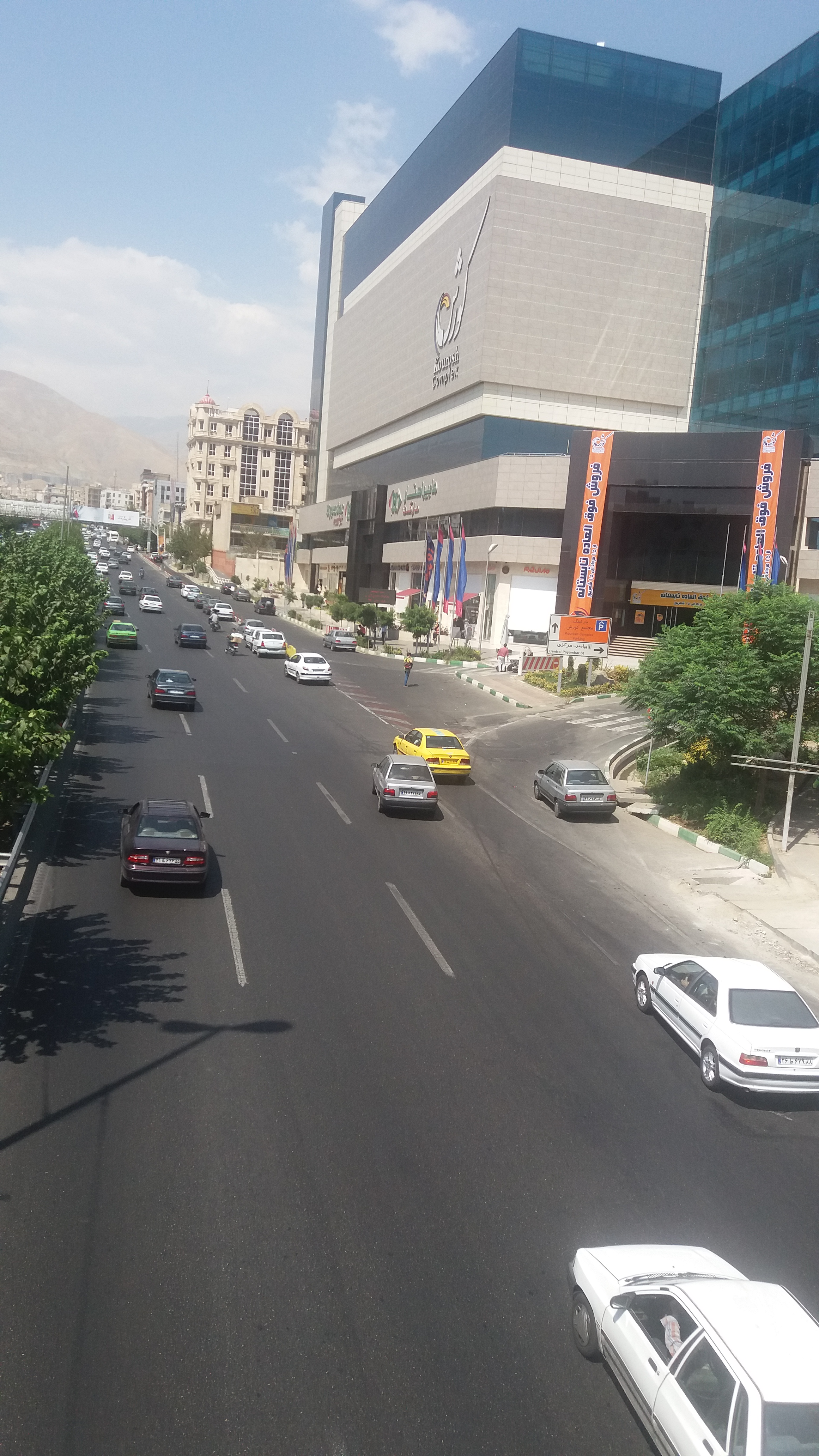 بزرگراه شهید ستاری و پردیس سینمایی کوروش- تهران - ۱۳۹۵